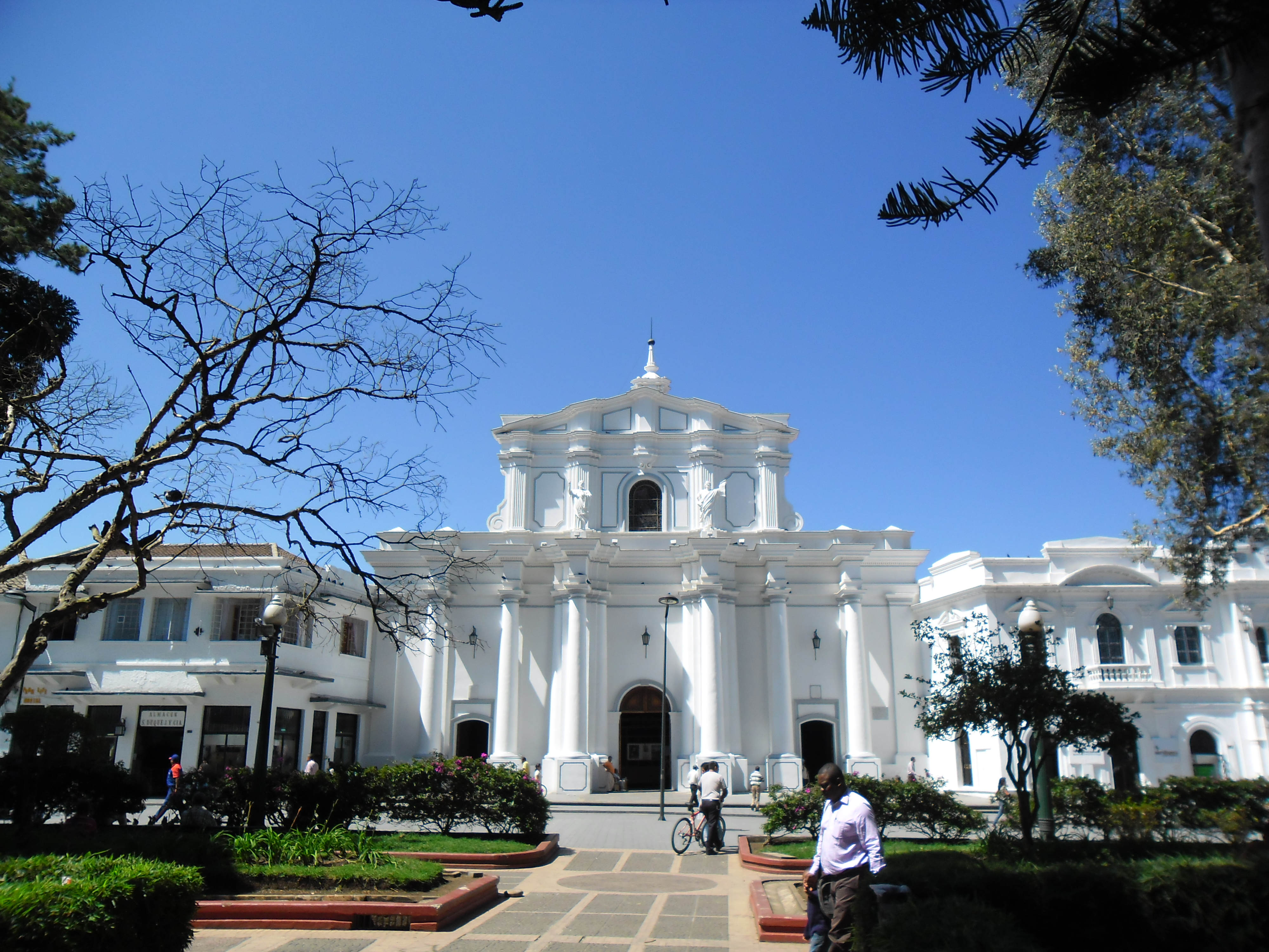 Catedral Emblematica de la ciudad de Popayán, Se Inauguró el 13 de enero de 1537. Es uno de los templos católicos mas representativos de la ciudad de Popayán, capital del departamento del Cauca; situada en el parque caldas en pleno centro histórico, reparado luego de sufrir averías por el terremoto de 1983. cabe anotar que es una magna obra arquitectónica que resalta el estilo colonial de la ciudad blanca de Colombia. 10-031